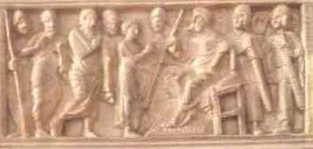 catedra